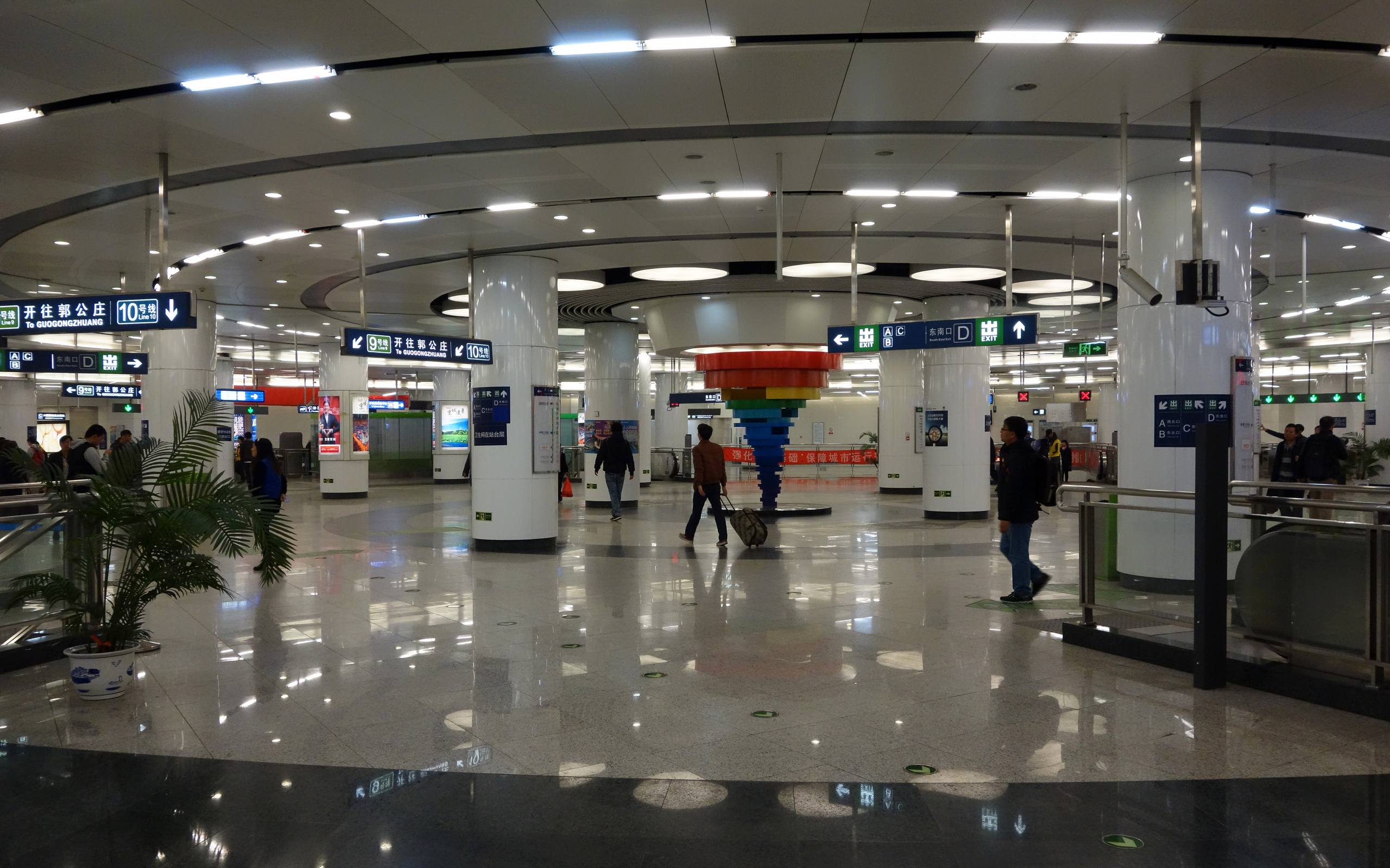 六里桥站9号线和10号线共用圆形整体式站厅